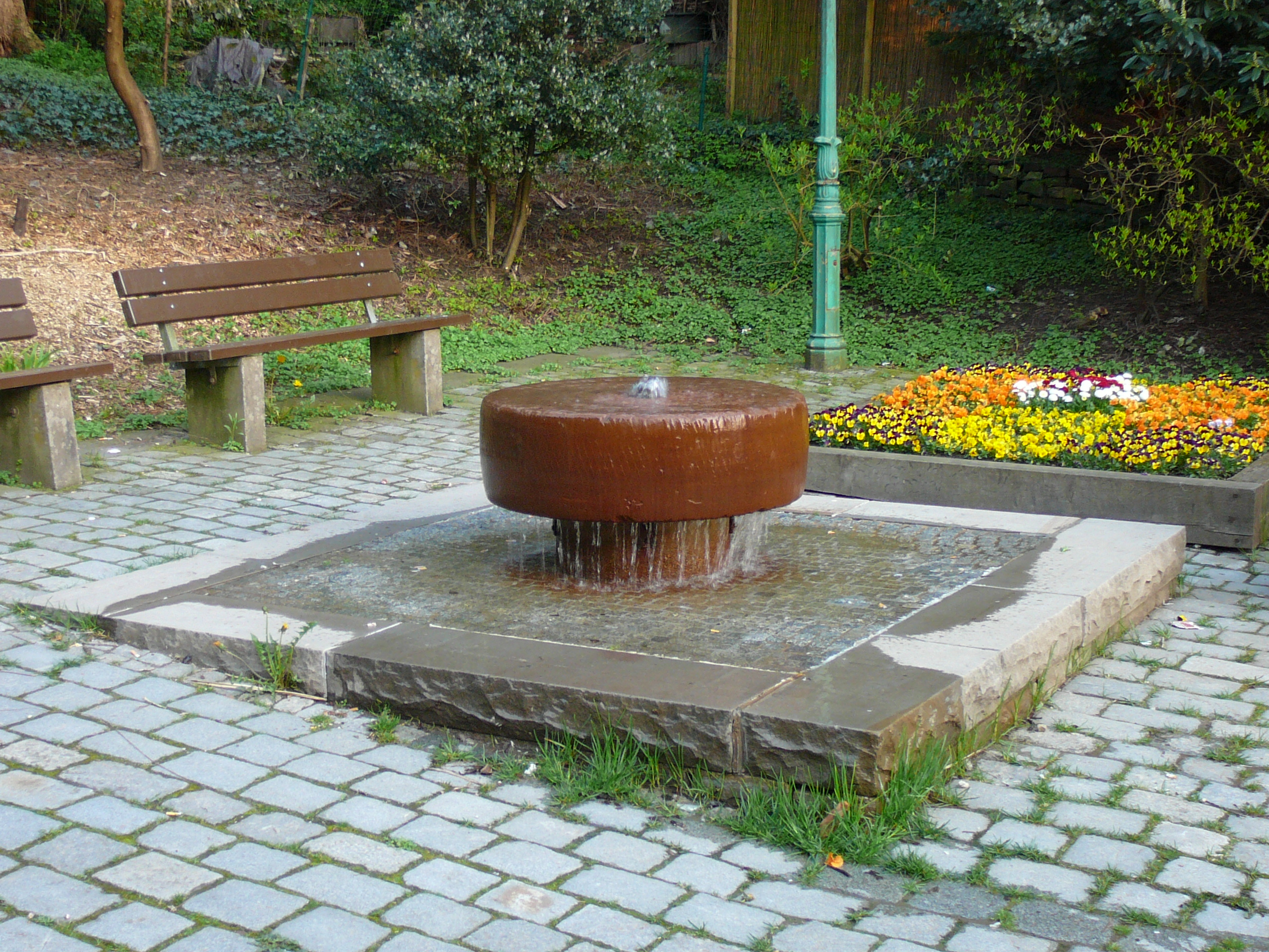 Borner Straße, Wuppertal